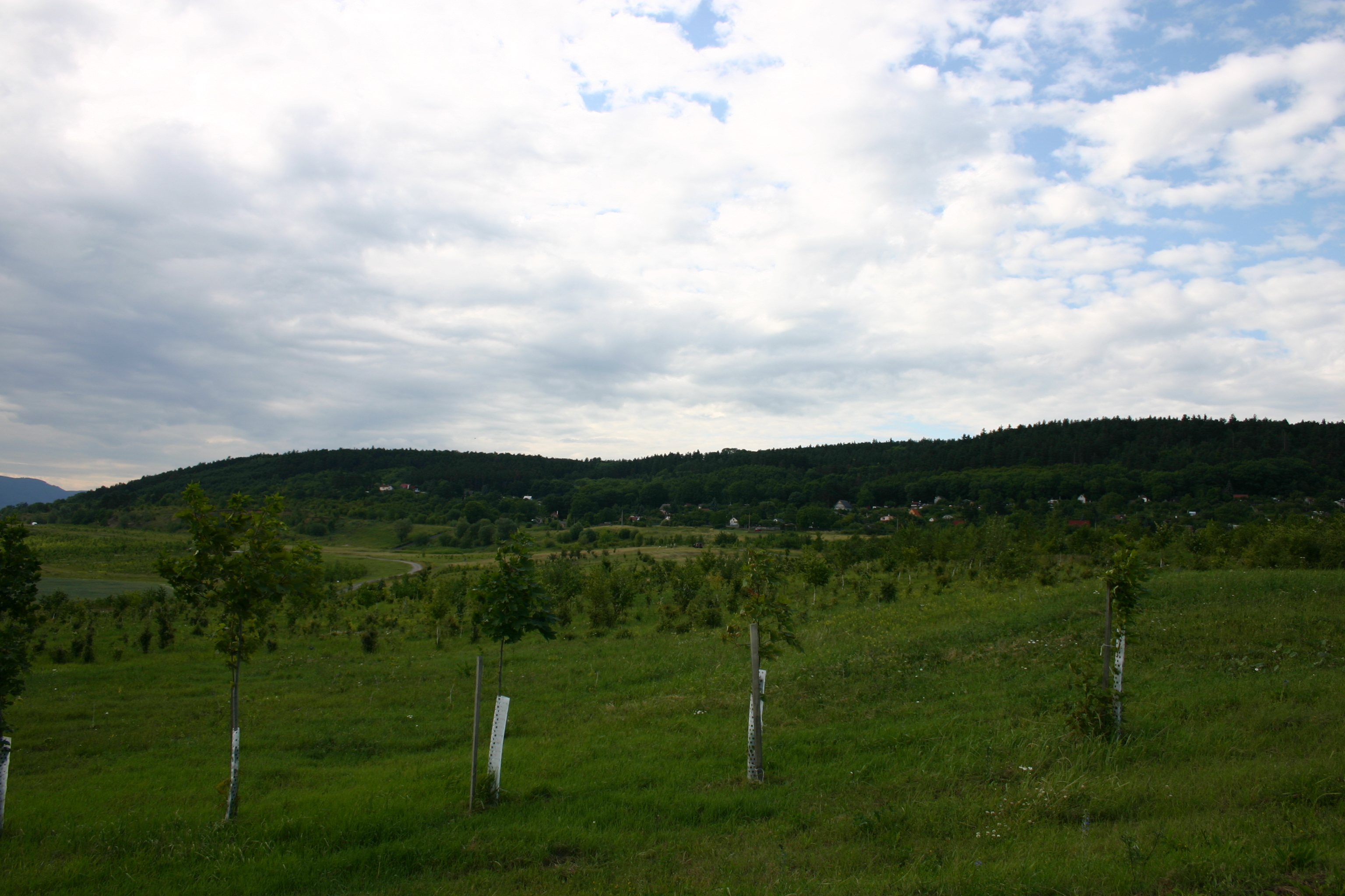 Kopec Ressl u Mostu